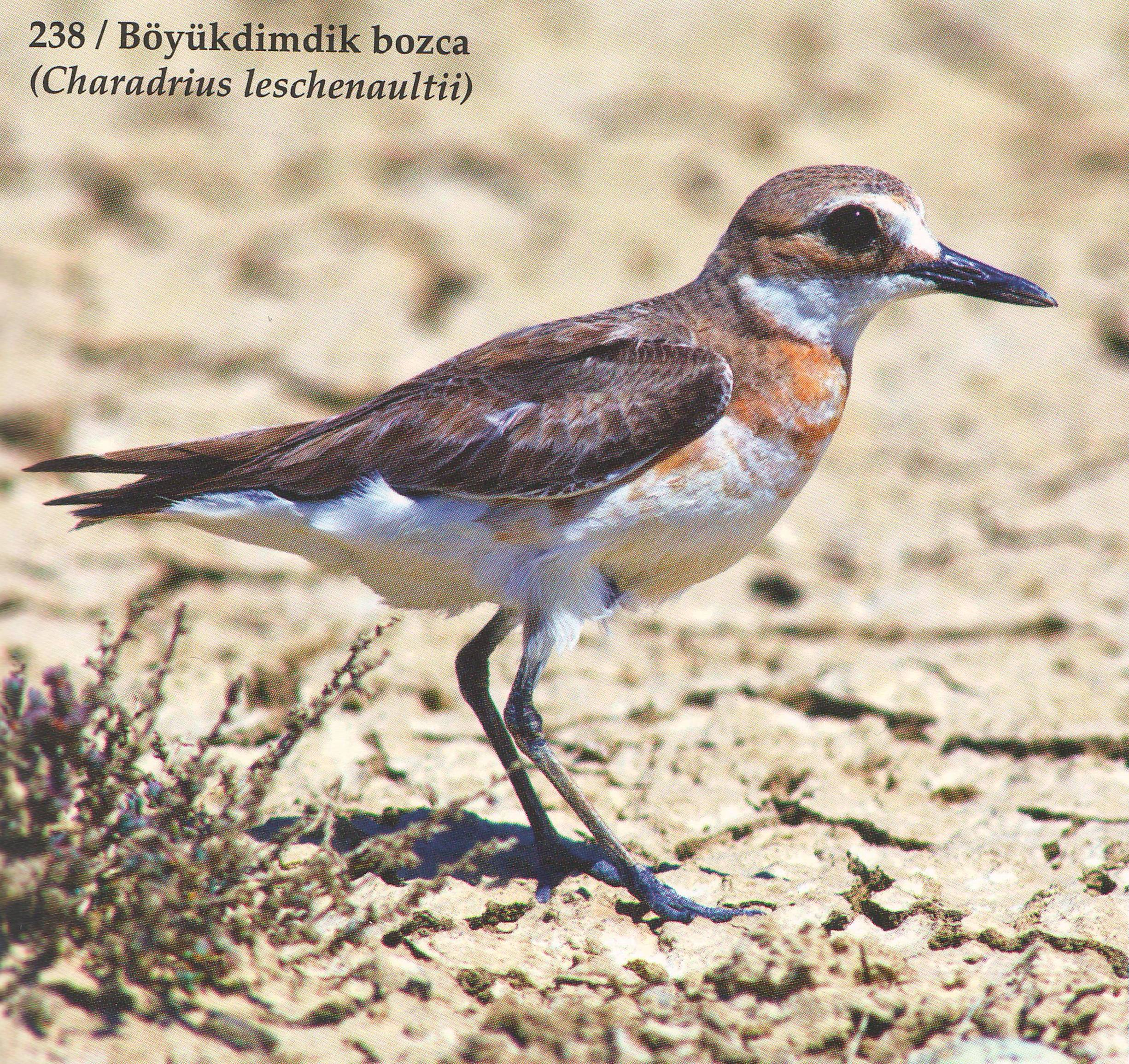 Zərdab Böyükdimdik Bozca